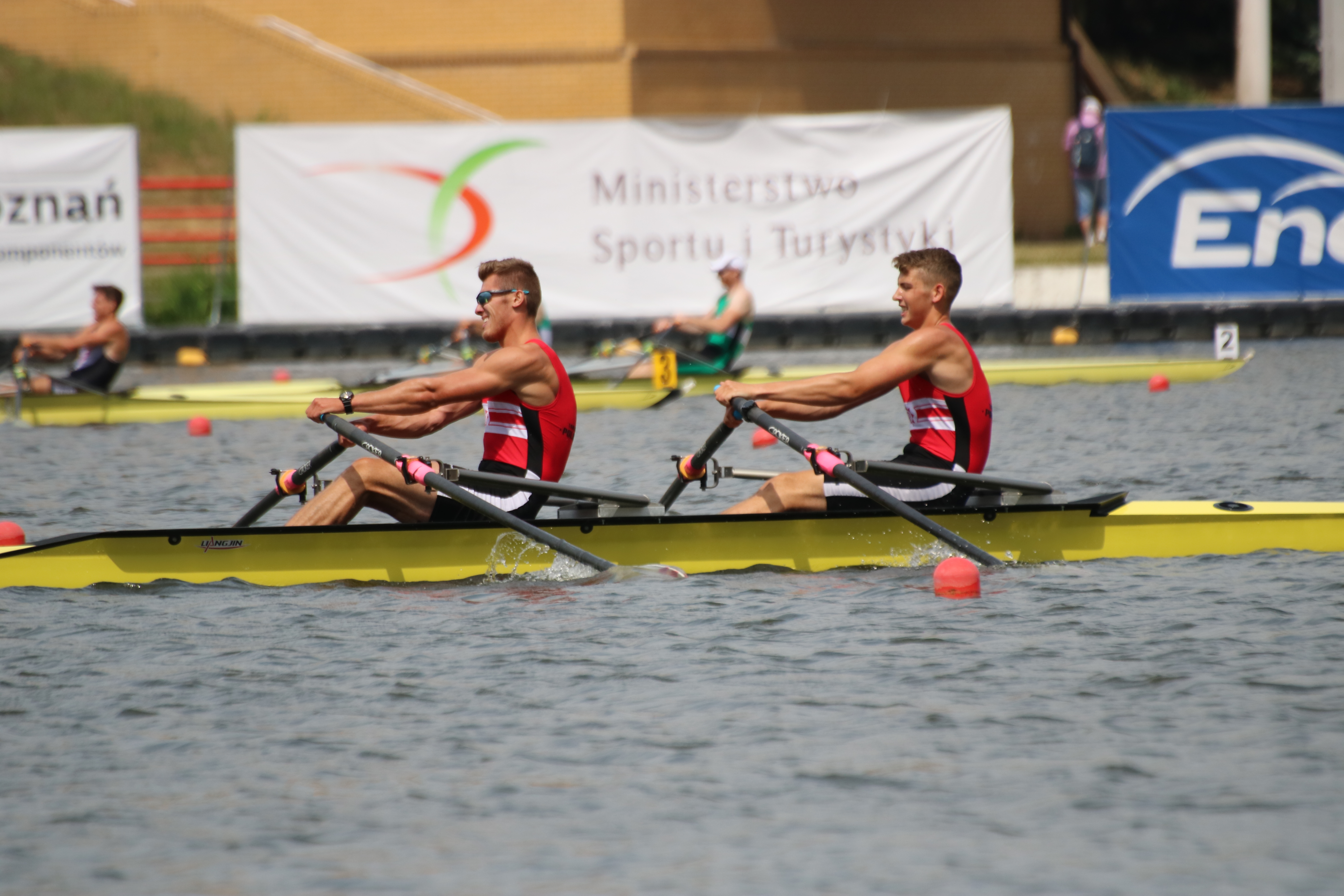 Mistrzostwa Polski Seniorów, Poznań (10.06.2018) - finisz biegu 2xMA - osada TW Polonia Poznań (M. Dopierała, D. Michałowski), V miejsce